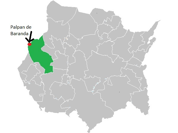 ubicacion de palpan de baranda en Miacatlan Morelos